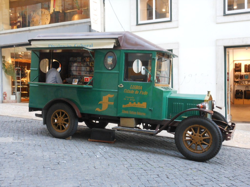 Fado Van